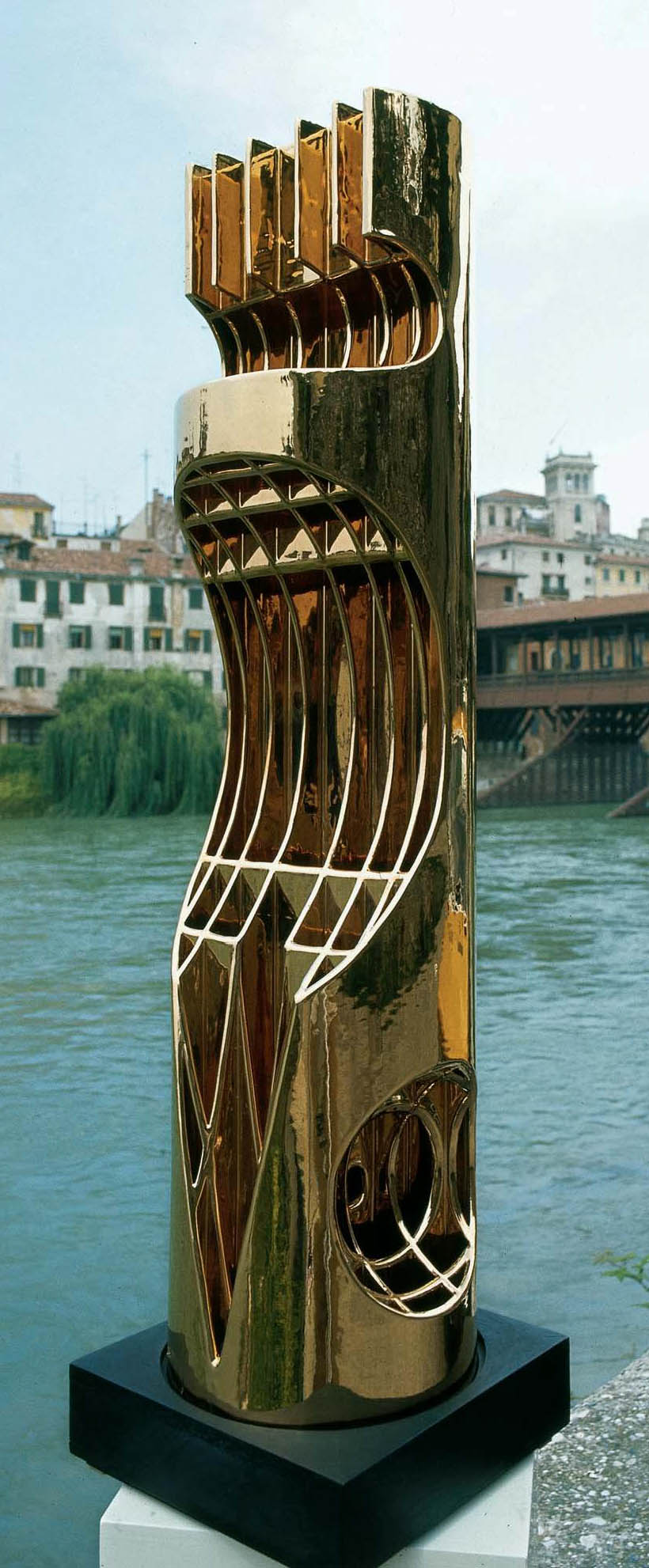 “Figura”. Argilla e maiolica dorata, cm 101 ø 23 di Amedeo Fiorese